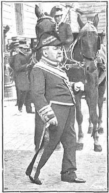 Retrato de Bernabé Dávila y Bertololi, en la revista Nuevo Mundo.